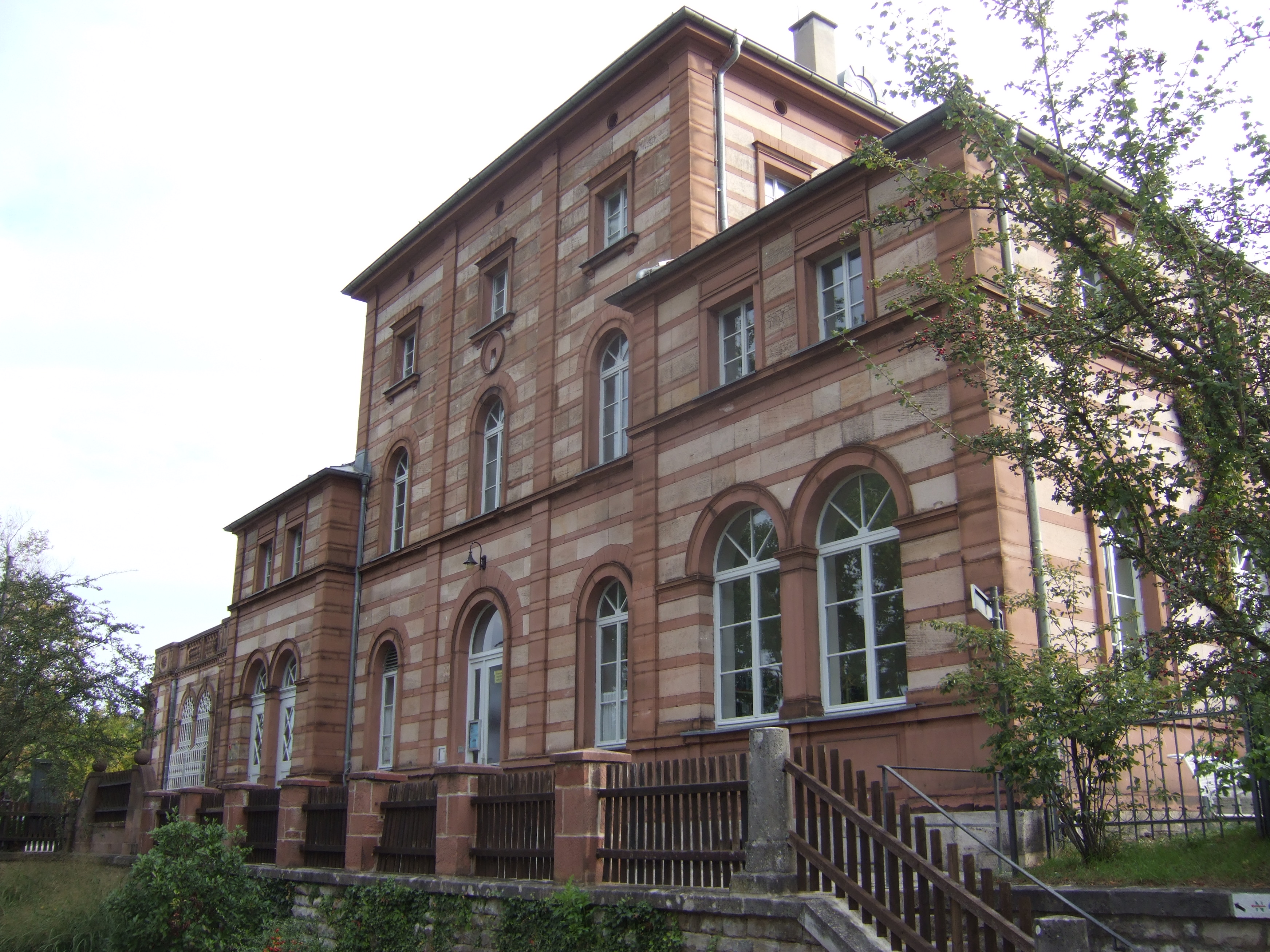 Veitshöchheims Bahnhof, Sandsteinquaderbau in reicher Ausführung mit Bahnsteigloggia, 1855 von Gottfried von Neureuther.